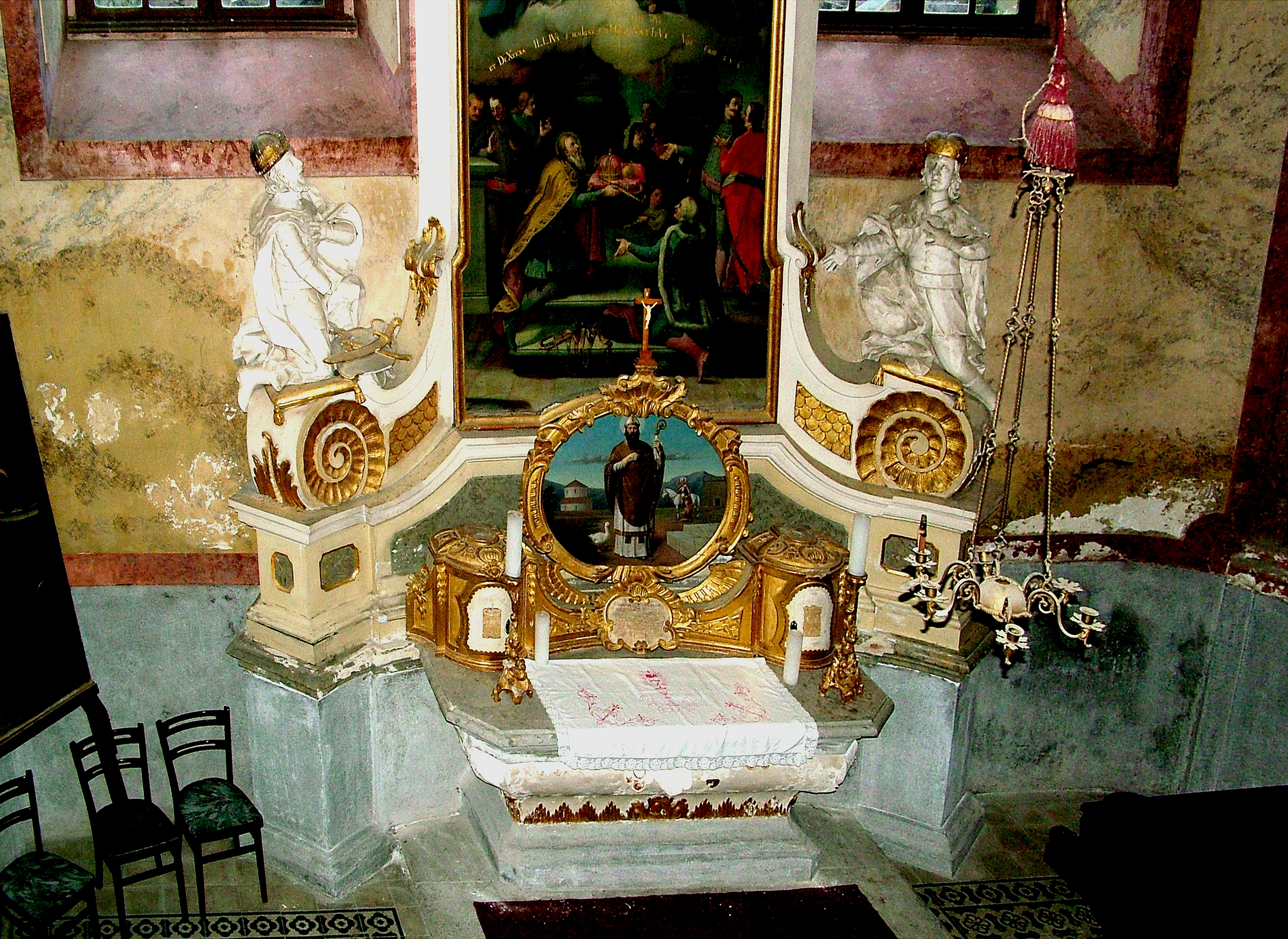 Sümegi püspöki palotakápolna részlete